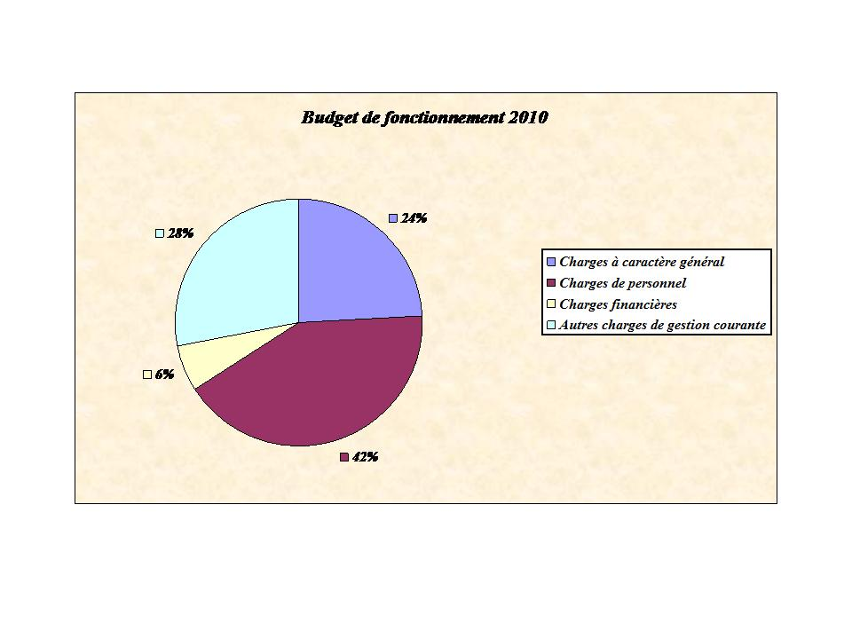 Courmangoux : diagramme budget 2010